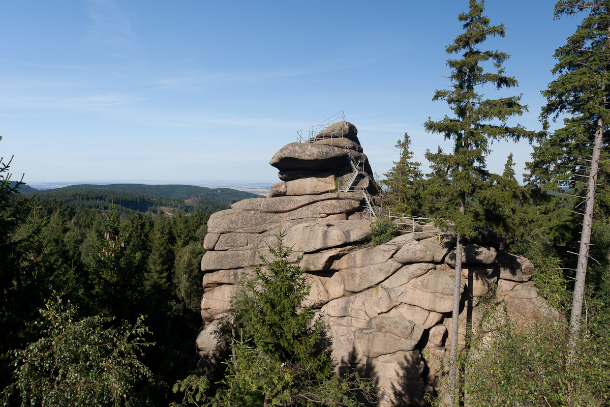 Ottofelsen bei Wernigerode / Harz